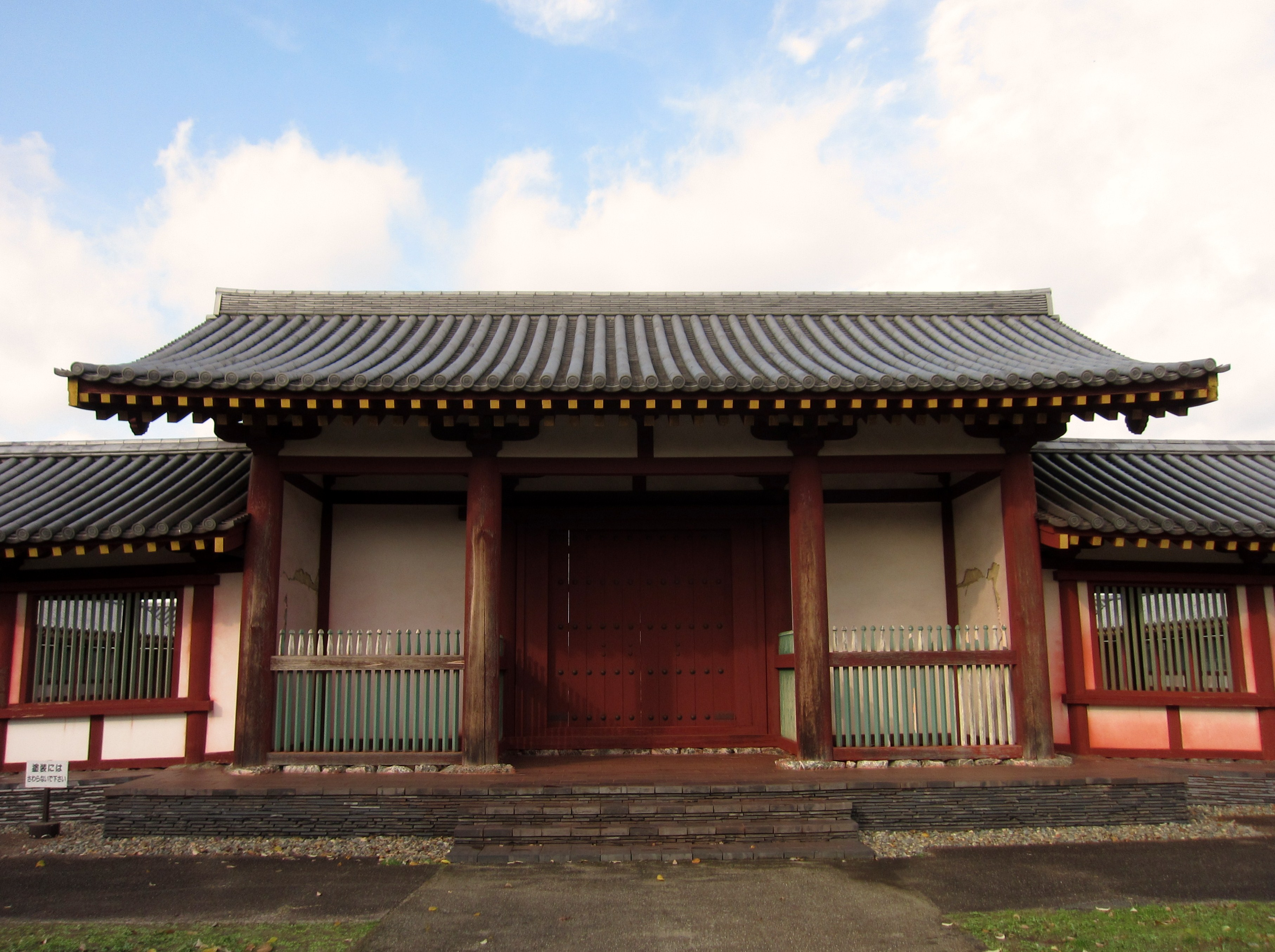 上総国分尼寺跡 中門